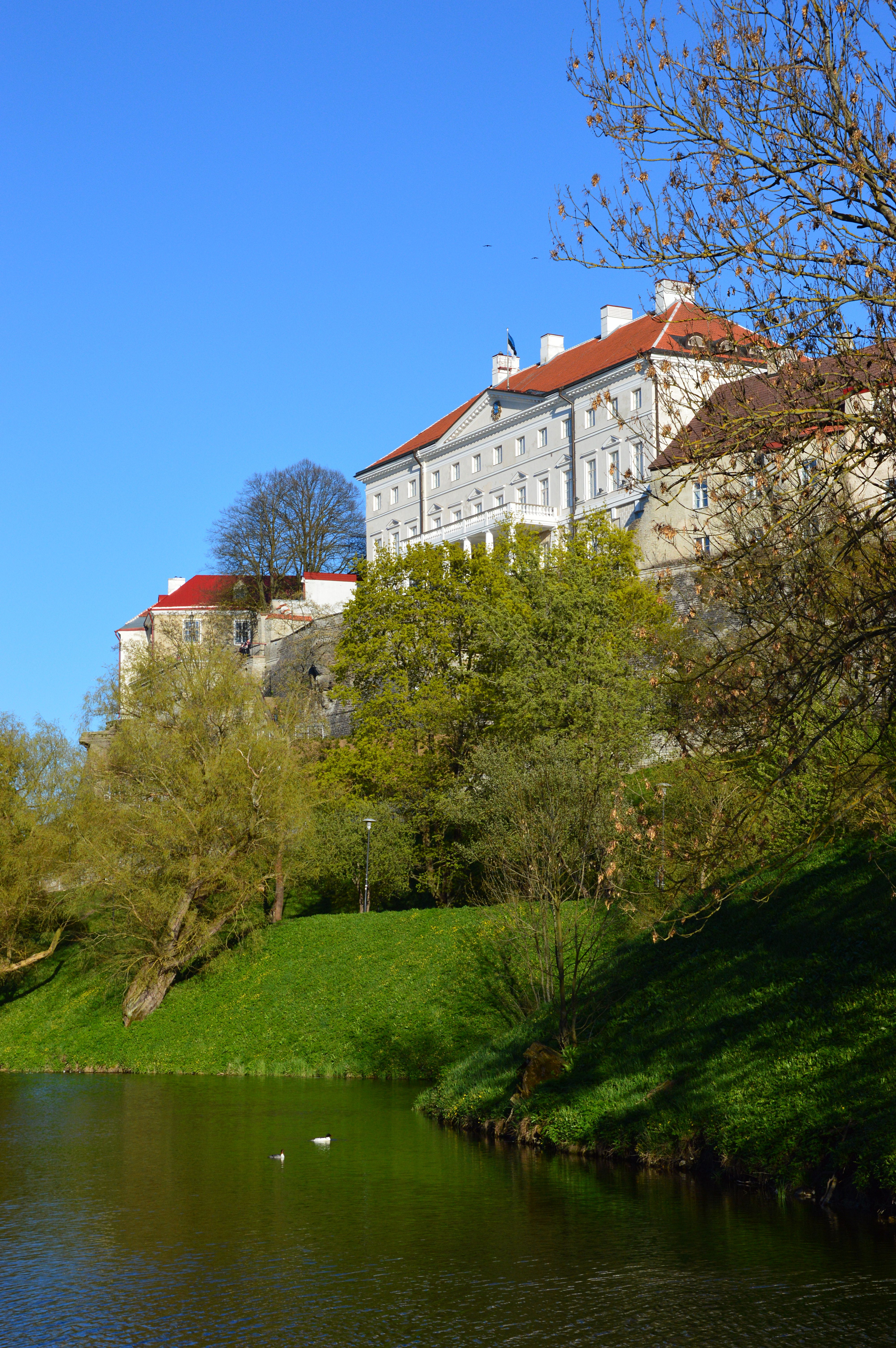 Stenbocki maja üle Snelli tiigi.